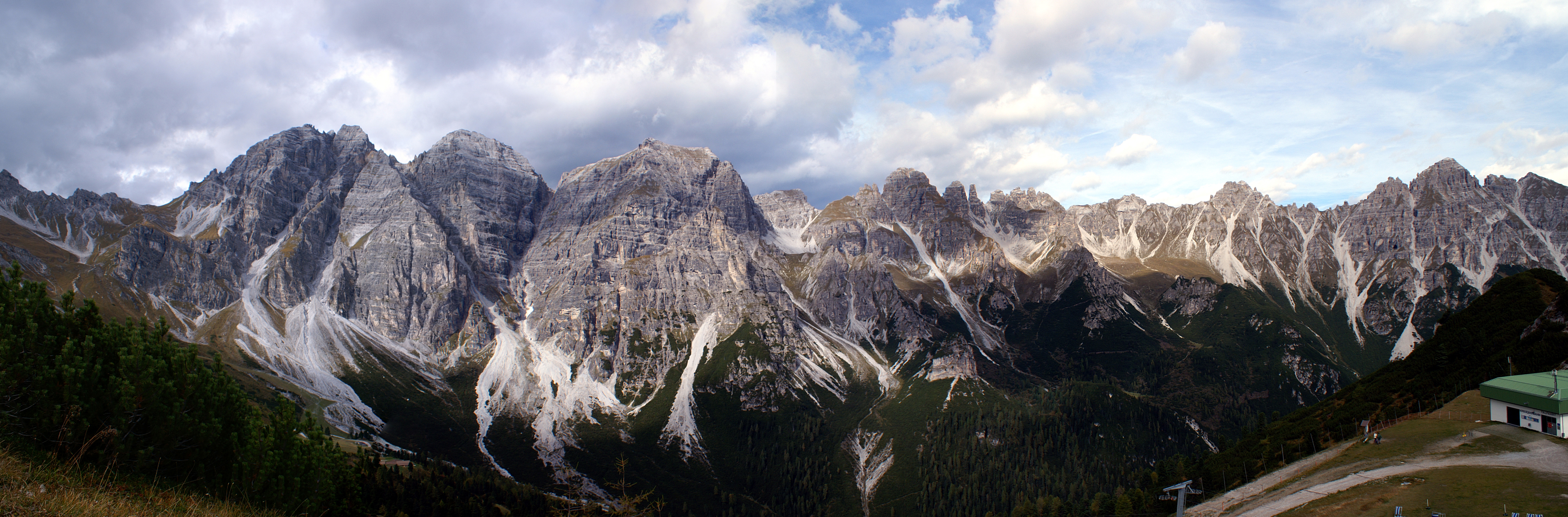 Südansicht der Kalkkögel (Standort: Kreuzjoch)